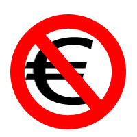 Logotipo con la señal de prohibición superpuesta sobre el símbolo monetario del euro. La imágen ha sido realizada por la persona que la subió al servidor (Usuario:KillOrDie) con Adobe Photoshop CS, un programa para el sistema operativo Windows. El autor de la misma la pone en dominio público.